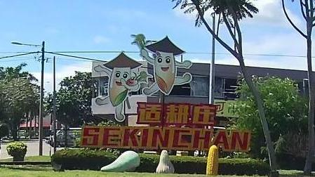 Sekinchan